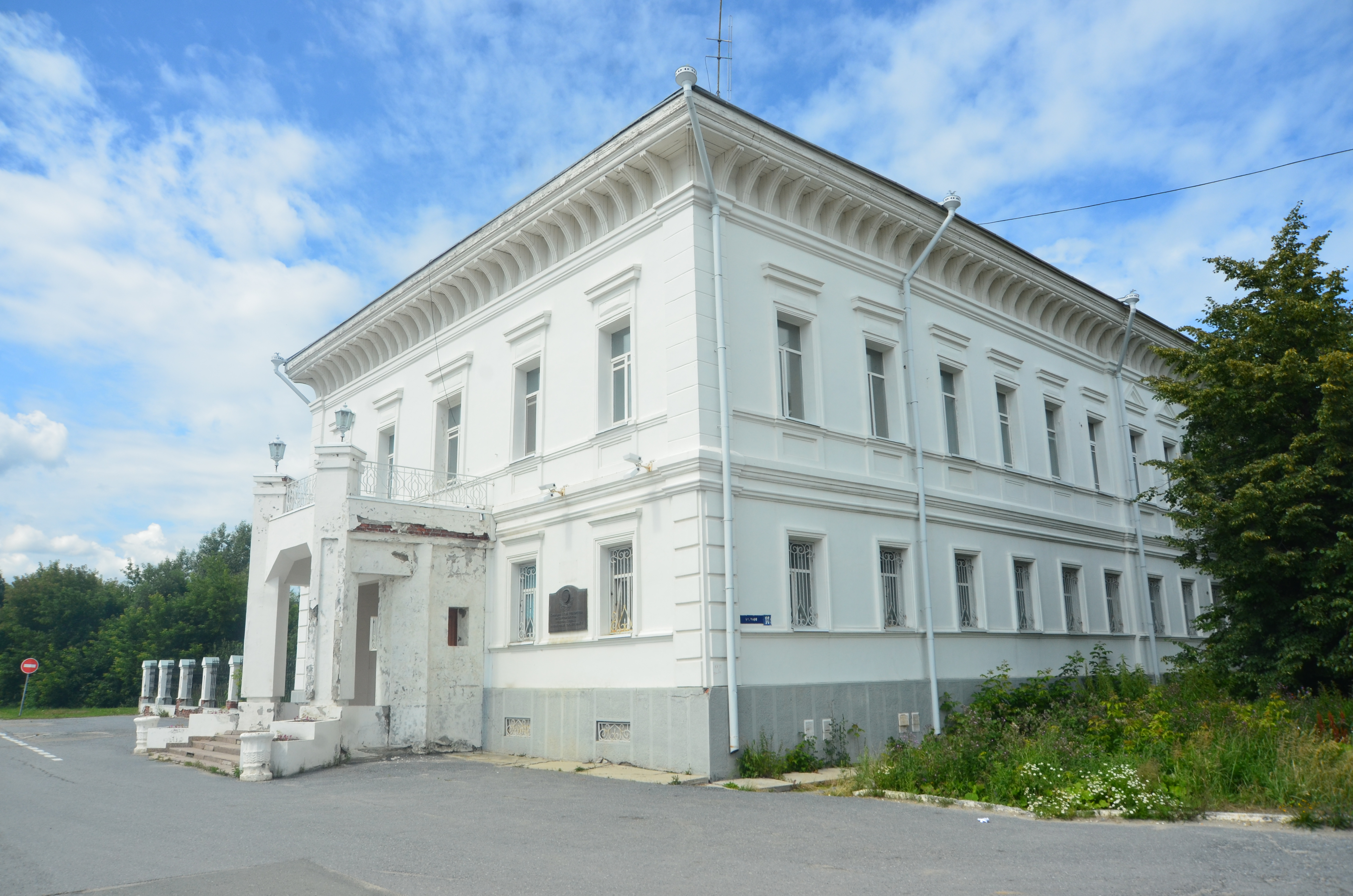 Дом генерал-губернатора, в котором в 1836-1851 гг. бывали многие декабристы по делам, связанным с пребыванием их на поселении: улица Мира, 10, Тобольск, Тюменская область